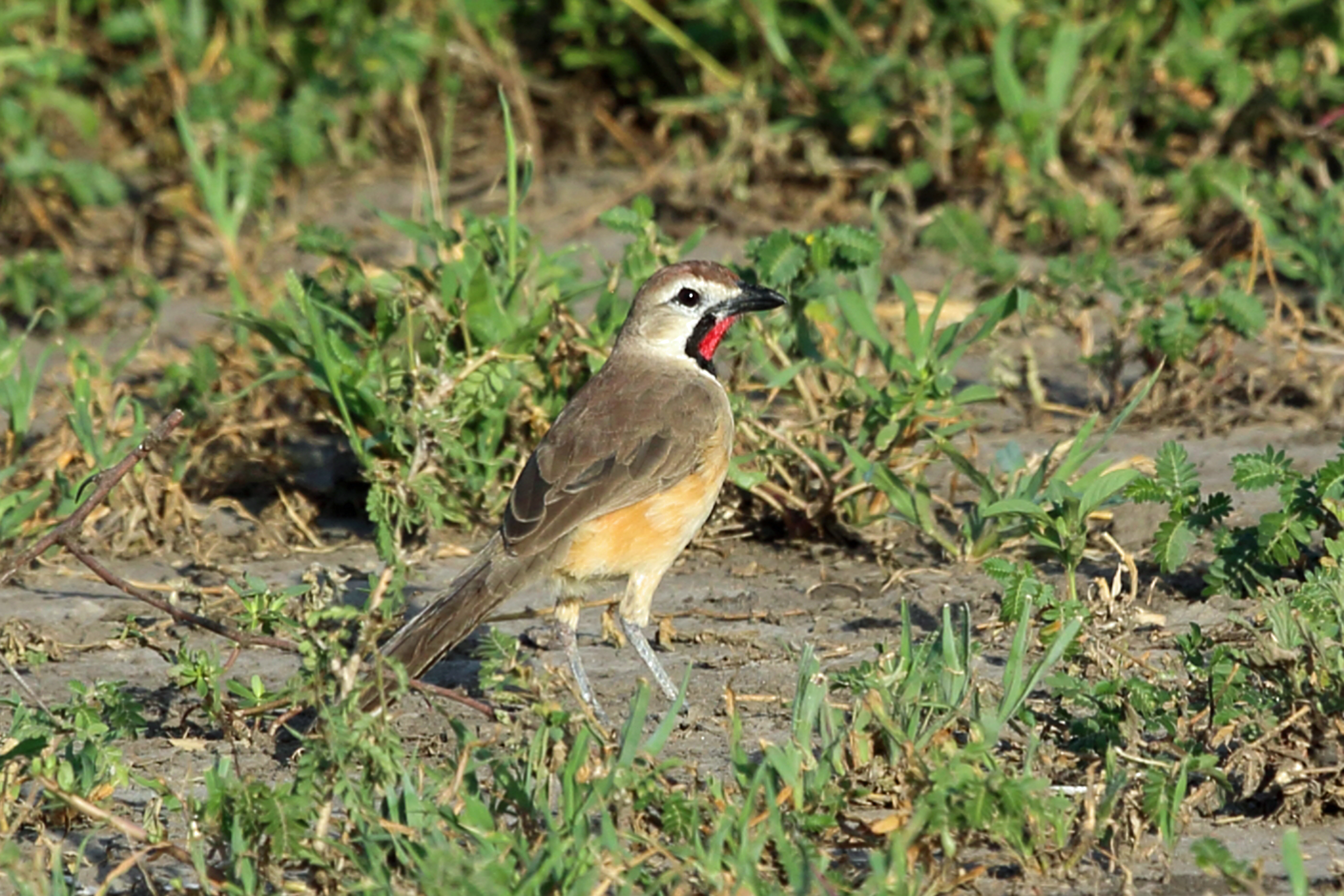 Rosy-patched Bushshrike, Tarangire, Tanzania